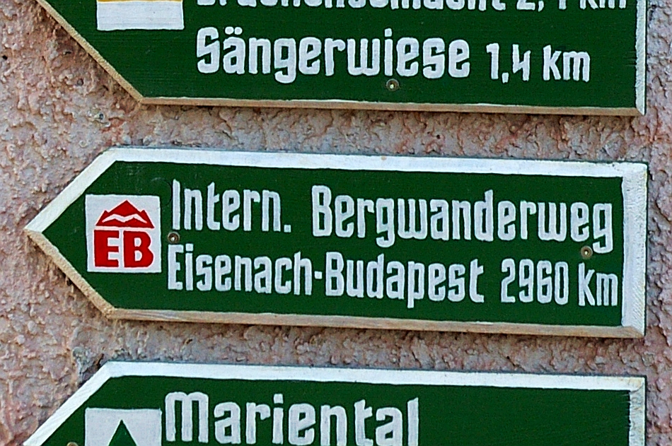 Internationale Bergwanderweg der Freundschaft Eisenach–Budapest, Schild auf der Wartburg